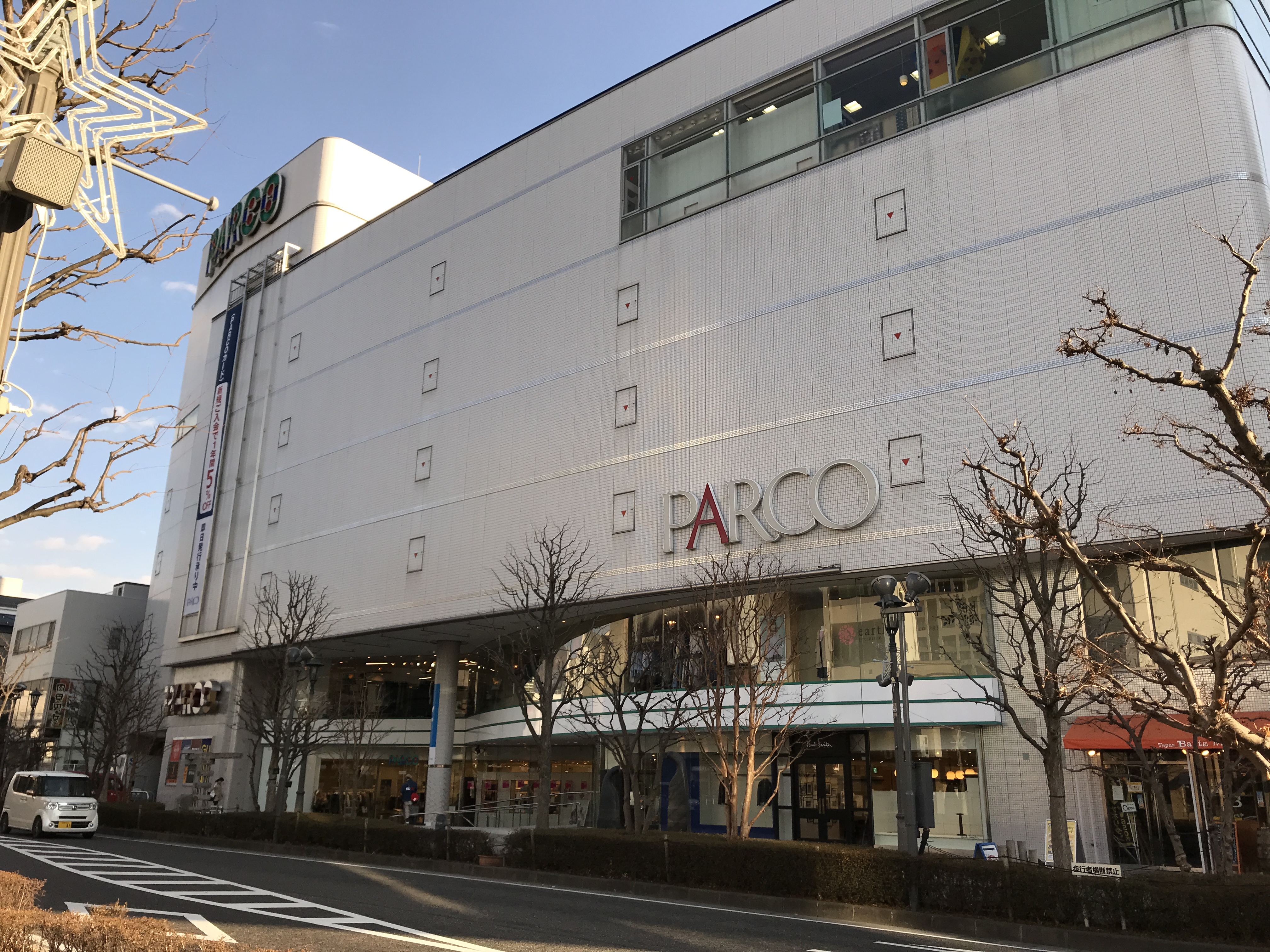 松本パルコ 2018